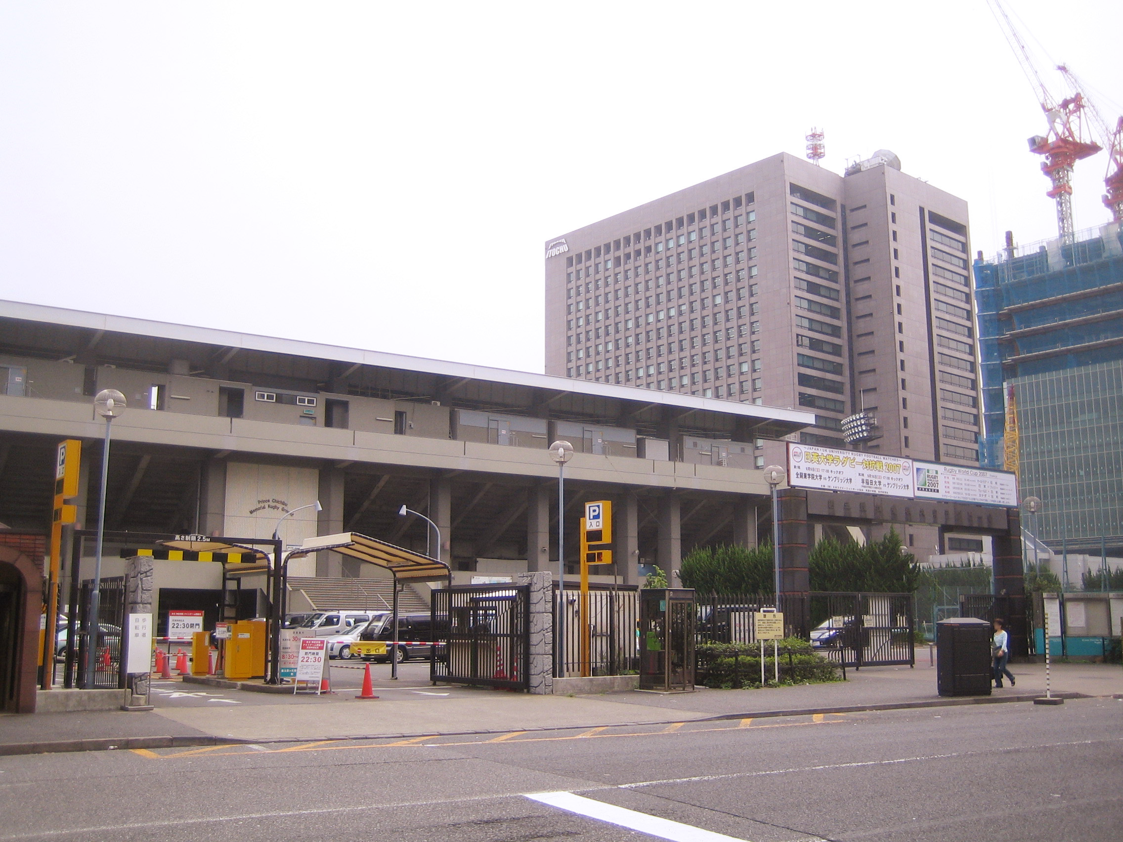 秩父宮ラグビー場。東京都港区北青山Chichibunomiya Rugby Stadium (秩父宮ラグビー場), at Kitaaoyama, Minato, Tokyo, Japan